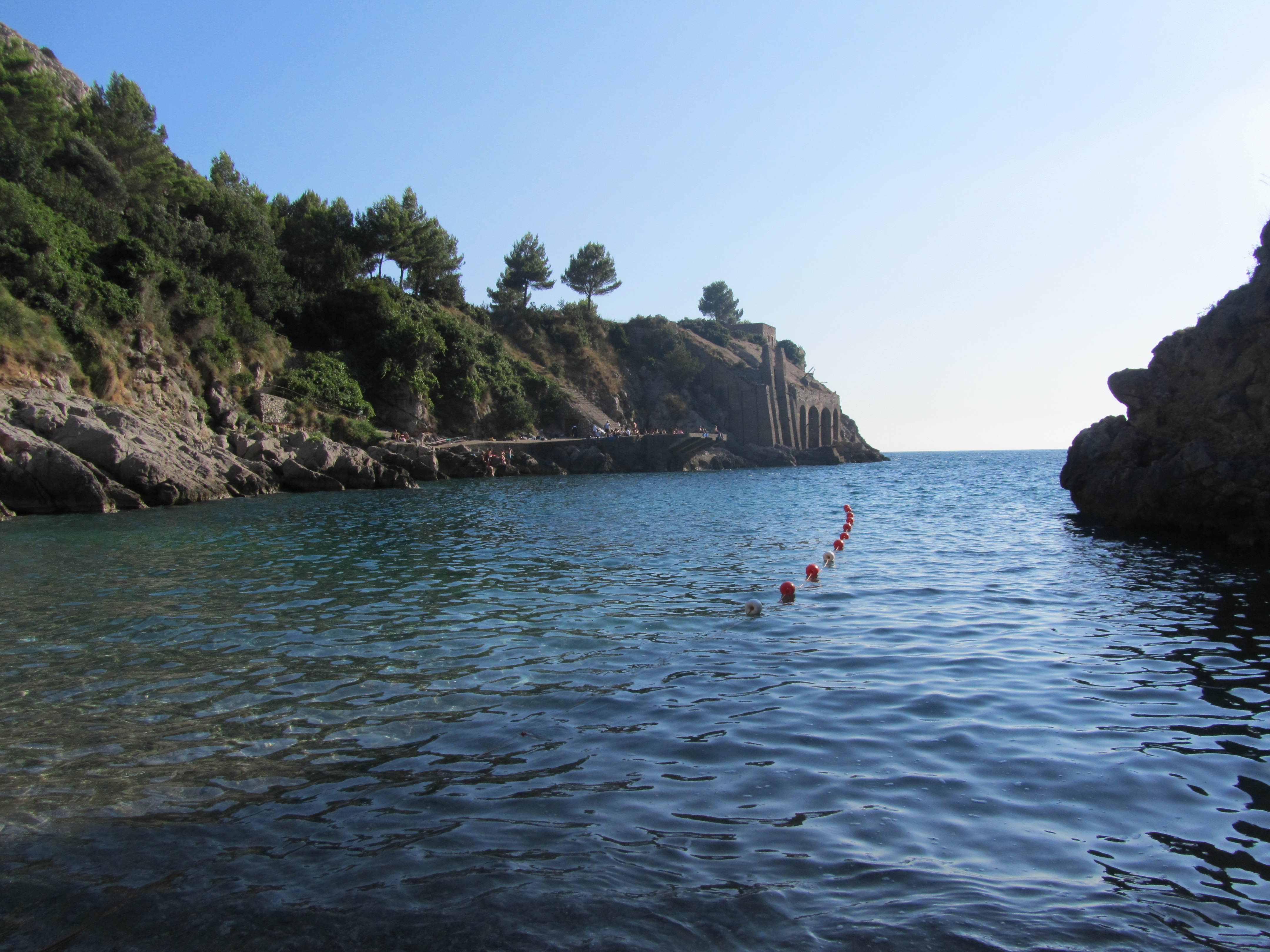 Spiaggia di Nerano (Frazione di Massa Lubrense, NA)